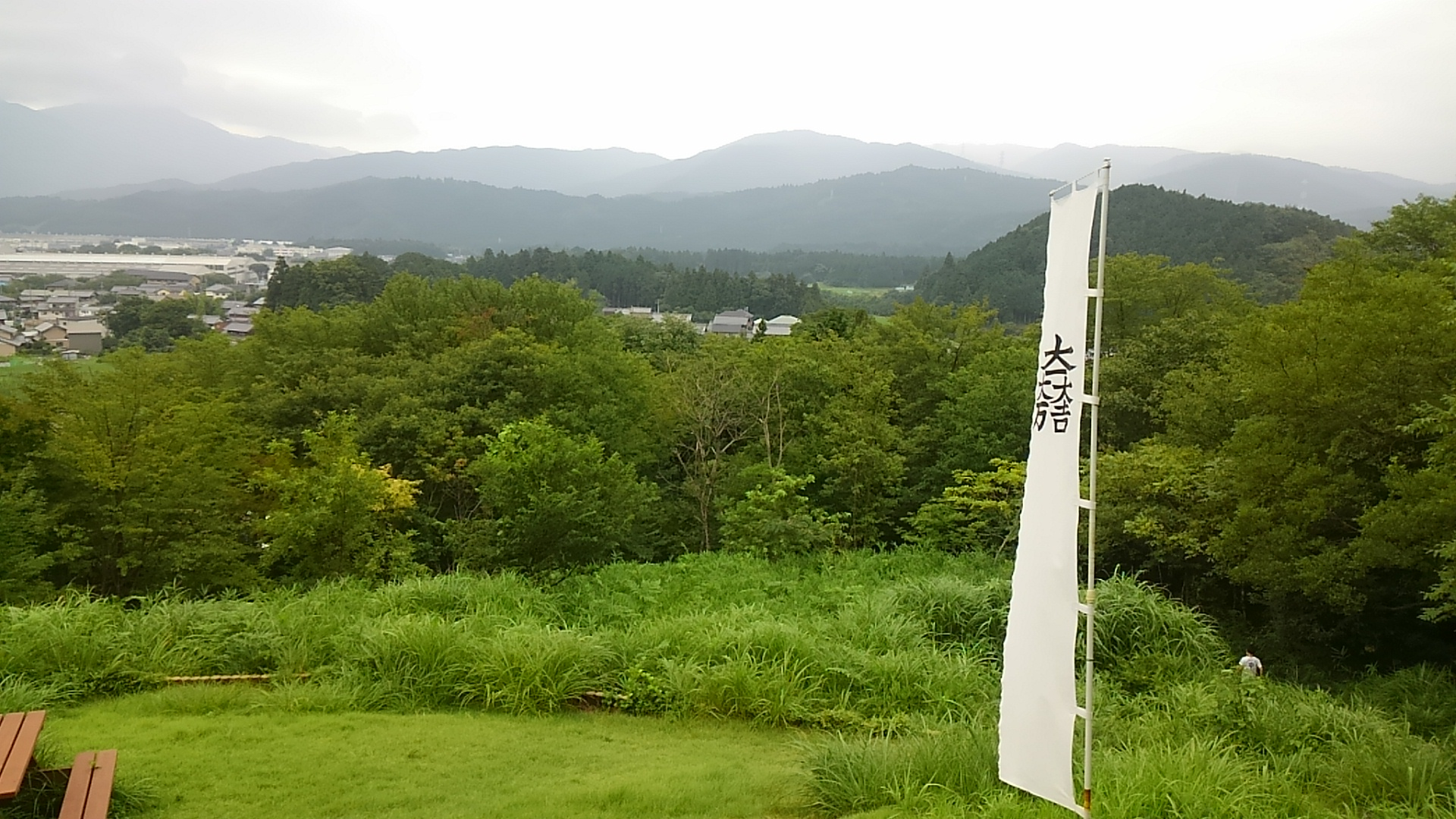 笹尾山山頂から松尾山を望む